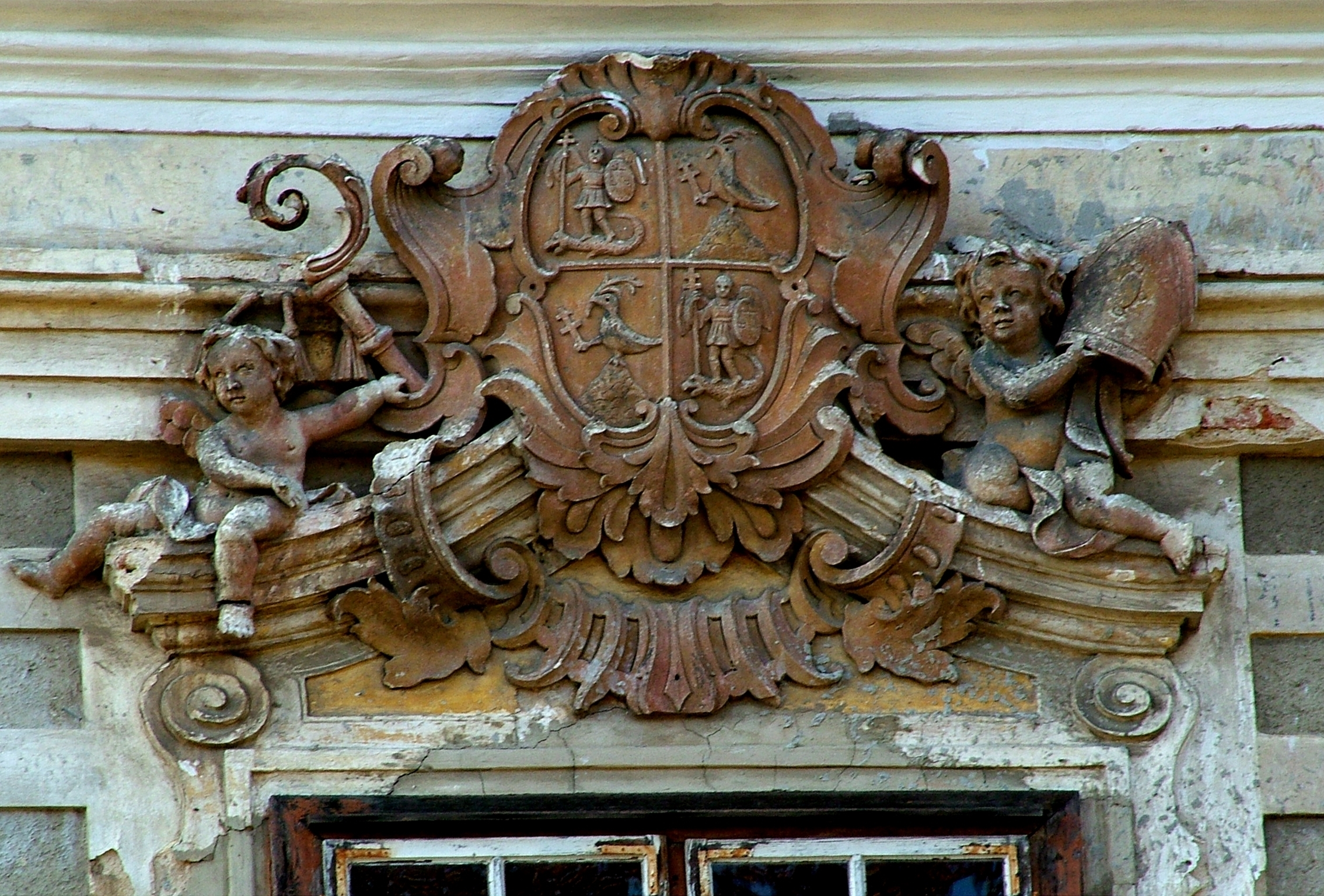 Padányi Bíró Márton címere a sümegi püspöki palotán